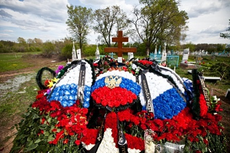 Могила Героя России Александра Прохоренко. Село Городки Тюльганского района Оренбургской области.